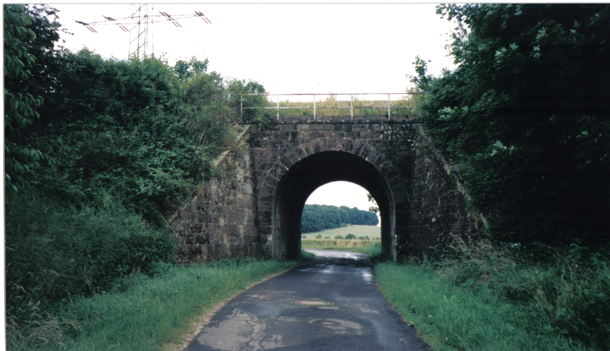 Brücke Film Postraub